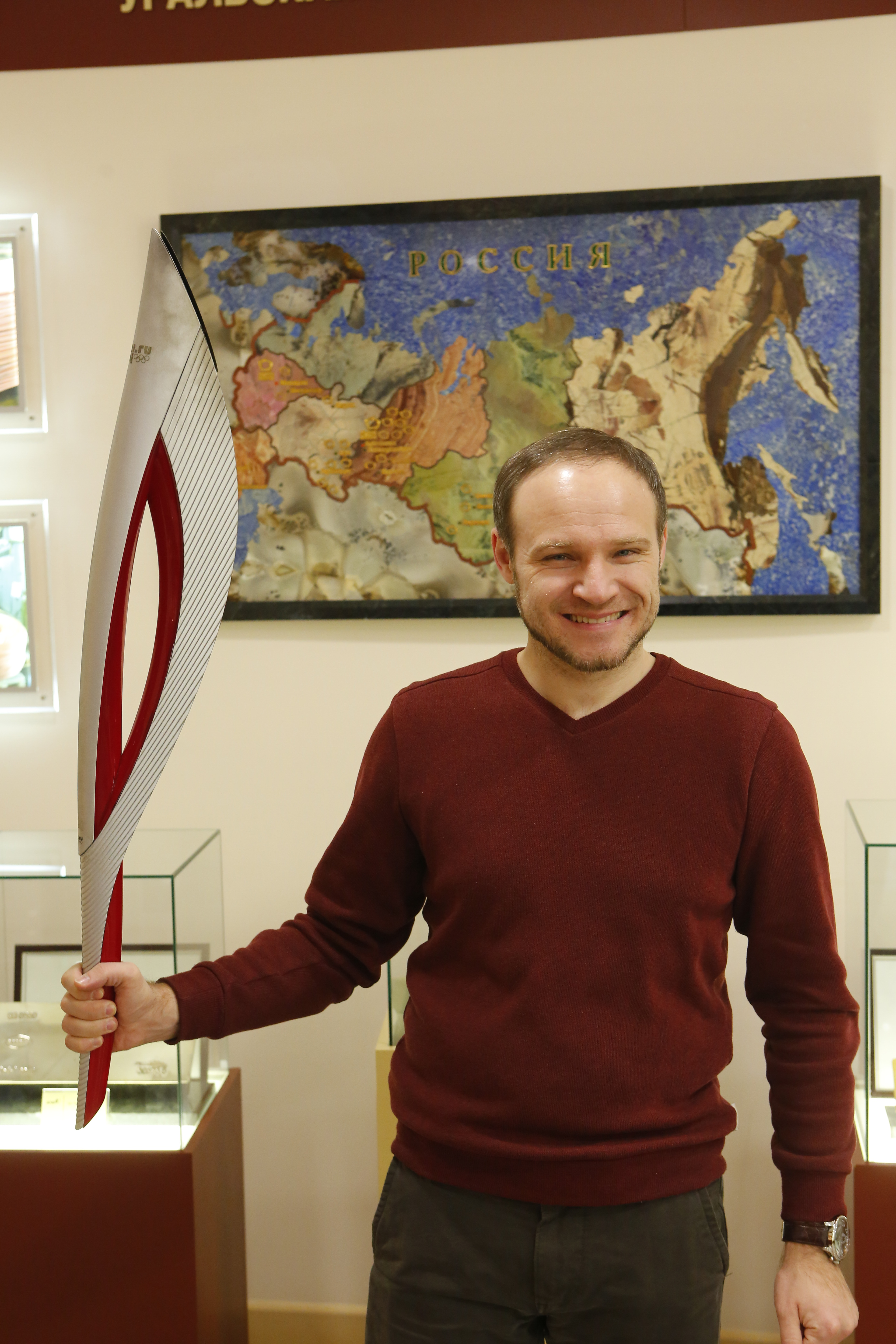 Верхняя Пышма. Музей УГМК. Олимпийский факел с олимпиады в Сочи.